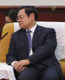 2015年1月13日，山西省委书记王儒林在太原市会见美国驻中华人民共和国大使马克斯∙博卡斯。（美国大使馆照片）